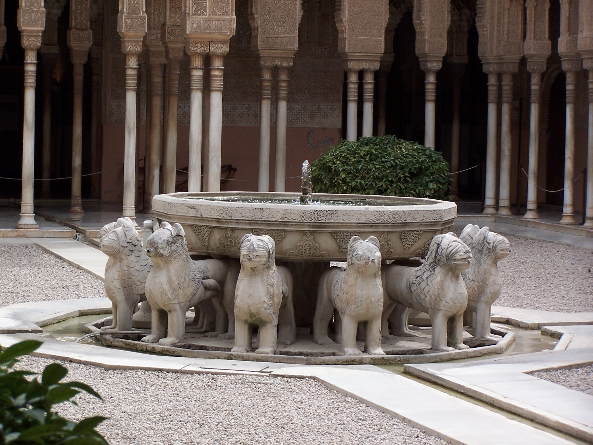 Detalle de la fuente de los Leones situada en el patio con el mismo nombre.Alhambra, Granada, España. Llama la atención la poca destreza del arte nazarí en contraste con su habilidad para decorar paredes.